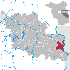 Eisenhüttenstadt in Brandenburg (Country) - District Oder-Spree